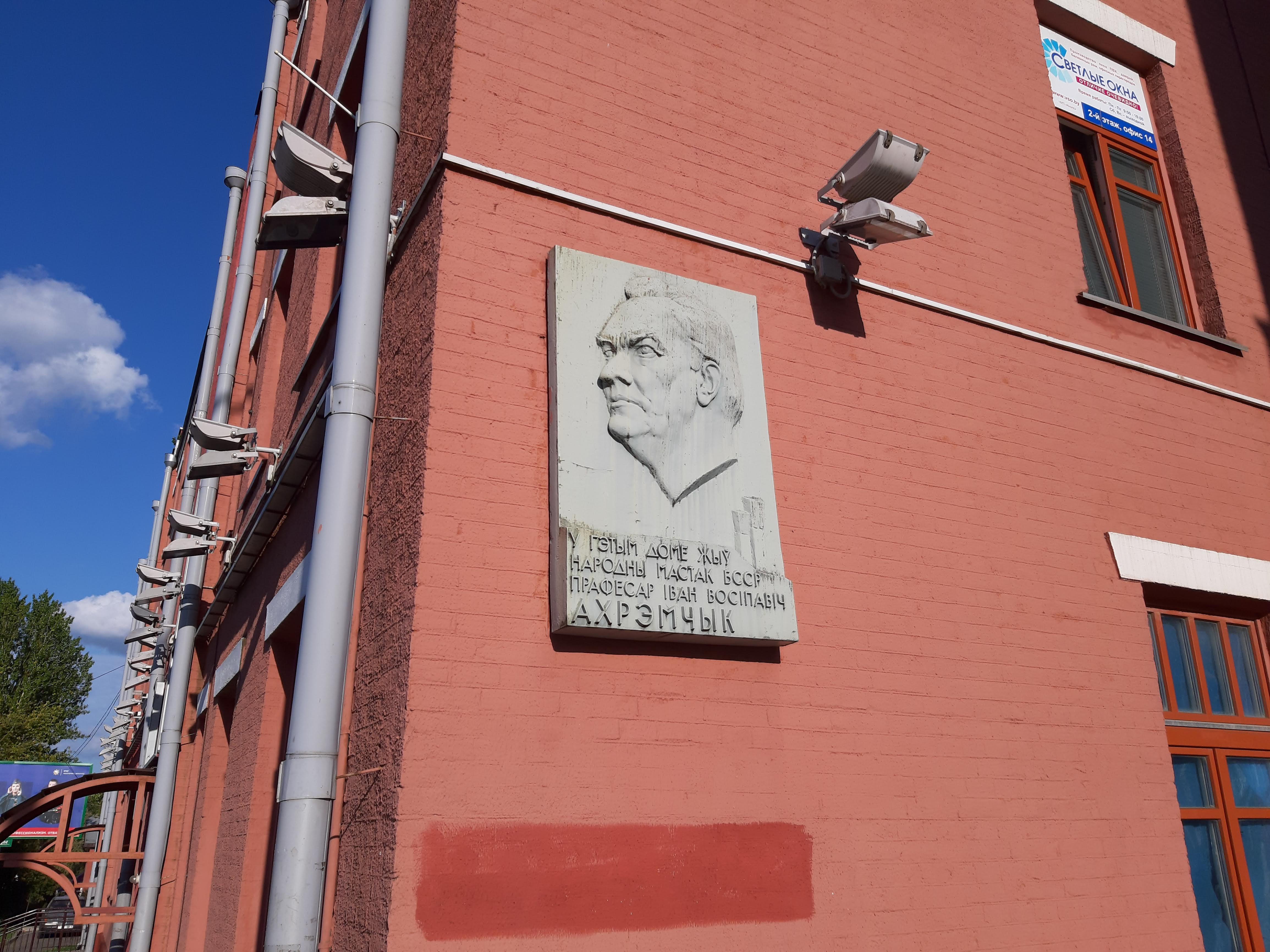 Мінск. Па Ульянаўскай